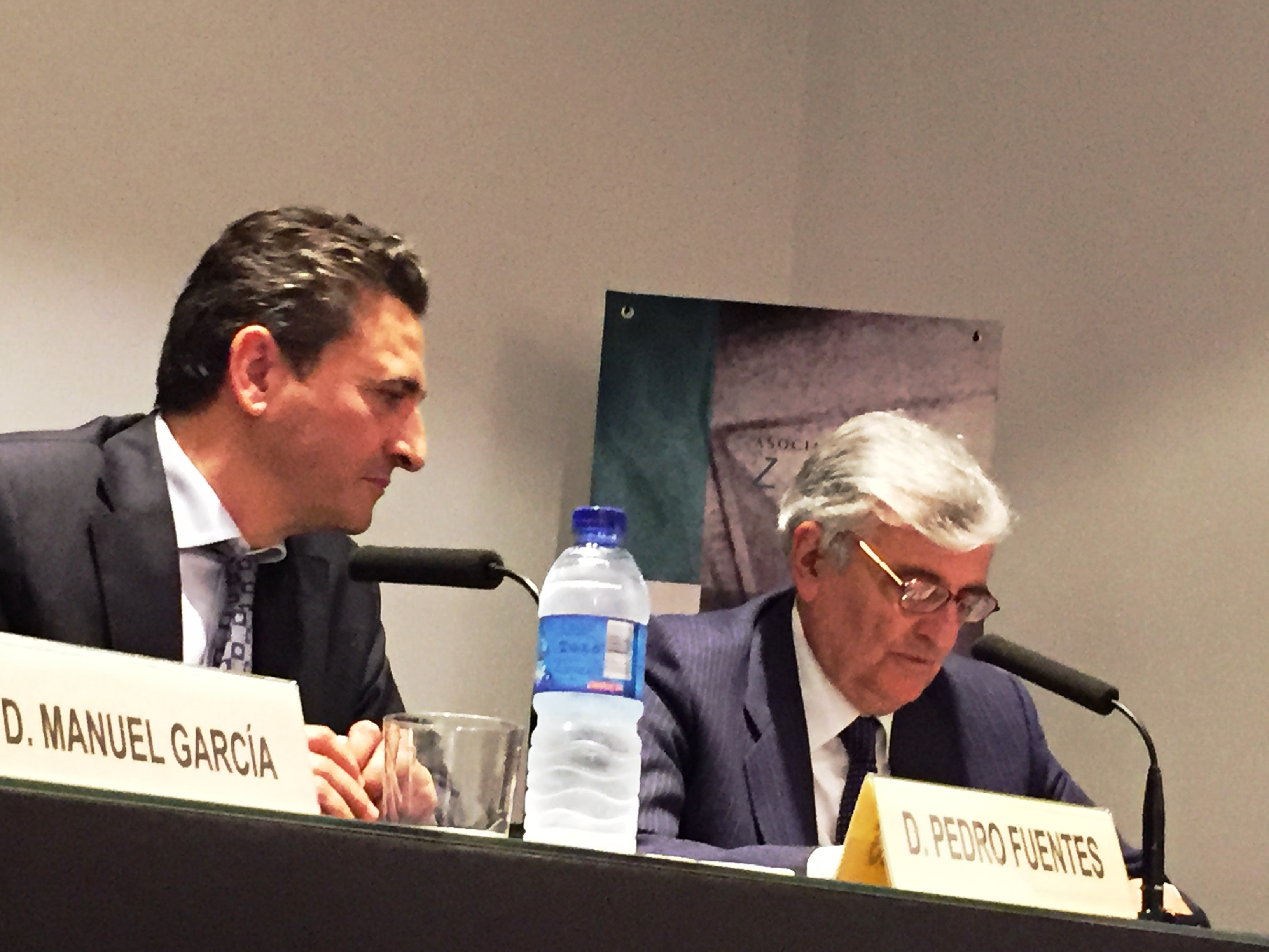 El artista español Pedro Fuentes junto al crítico cinematográfico Eduardo Torres-Dulce durante la presentación en Madrid del libro "El nombre de la luz oscura".